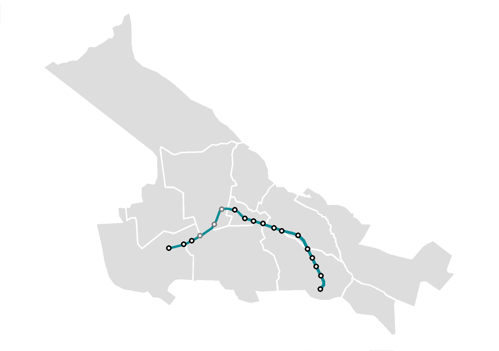 نقشه جغرافیایی مترو تبریز